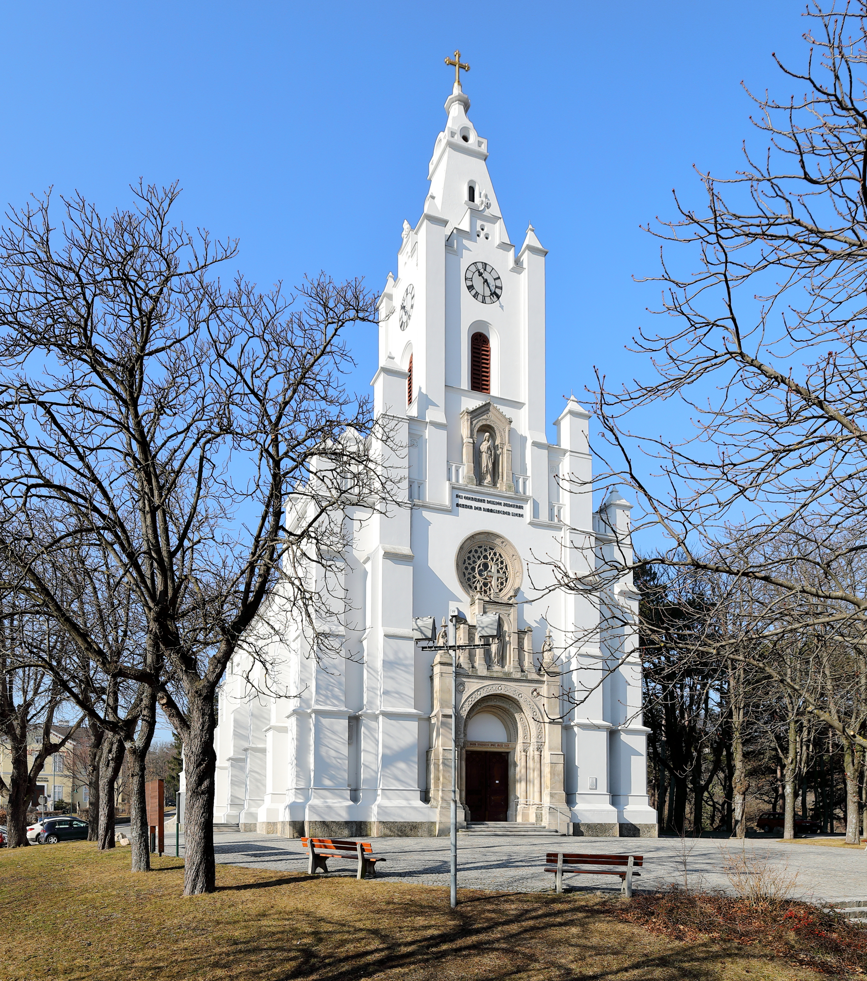 Ostsüdostansicht der röm.-kath. Stadtpfarrkirche hl. Jakobus der Ältere in der niederösterreichischen Stadtgemeinde Bad Vöslau.Die gewestete Saalkirche mit dominanter Osturmfassade im romantischen Rundbogenstil am Übergang zum strengen Historismus wurde von 1860 bis 1870 nach Plänen des Architekten Franz Sitte errichtet. Die vom Grafen Moritz II. von Fries (1804–1887) gestiftete Kirche ist das Hauptwerk des Architekten und ist der bedeutendste Sakralbau der Zeit im südlichen Niederösterreich.